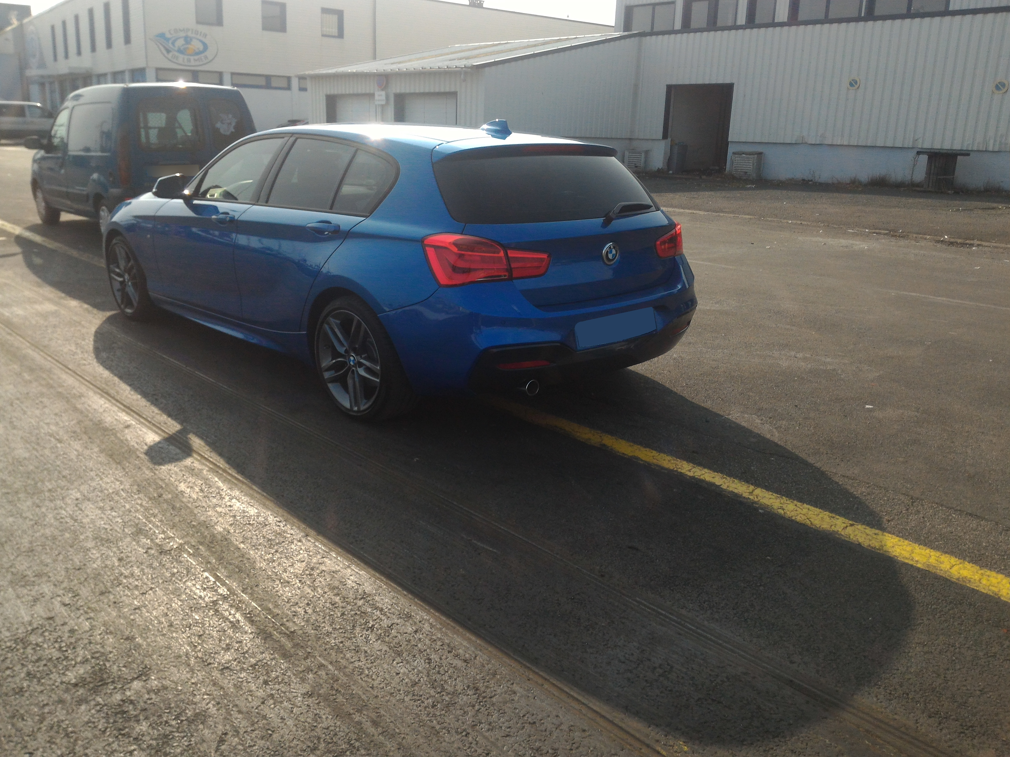 BMW Série 1 118d (F20) avec le pack M Sport - restylage de 2015